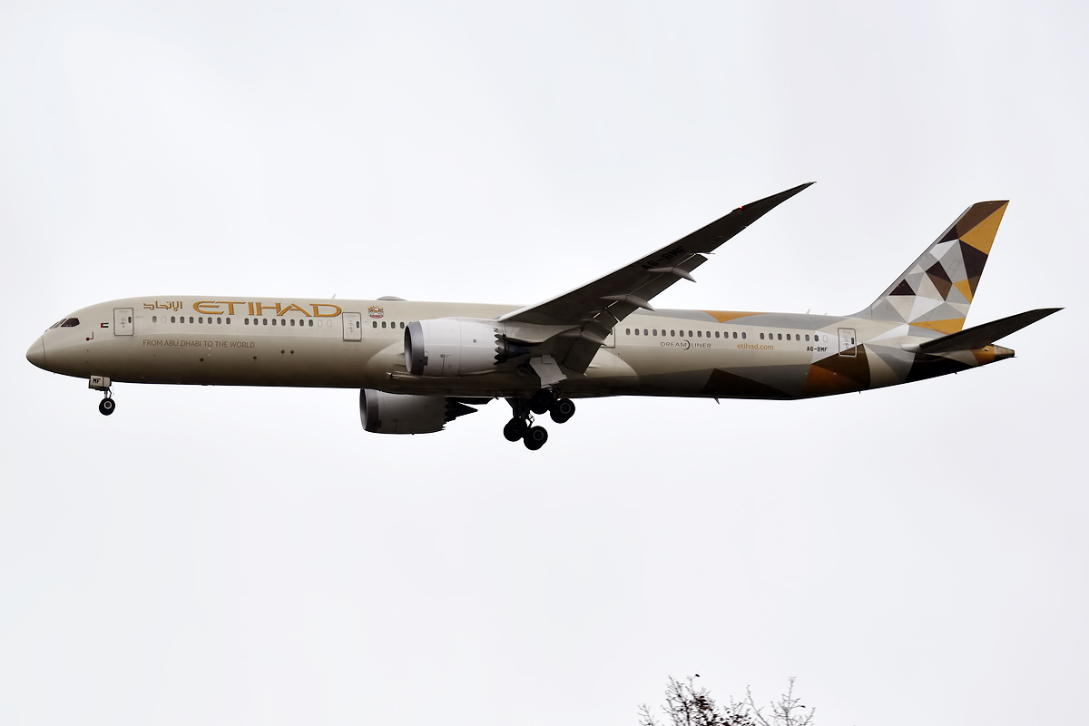 Etihad, A6-BMF, Boeing 787-10 Dreamliner